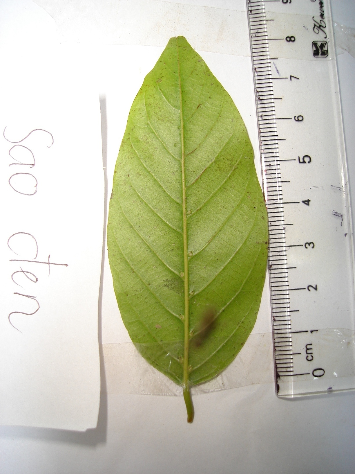 Hình thái mặt dưới lá cây Sao đen.